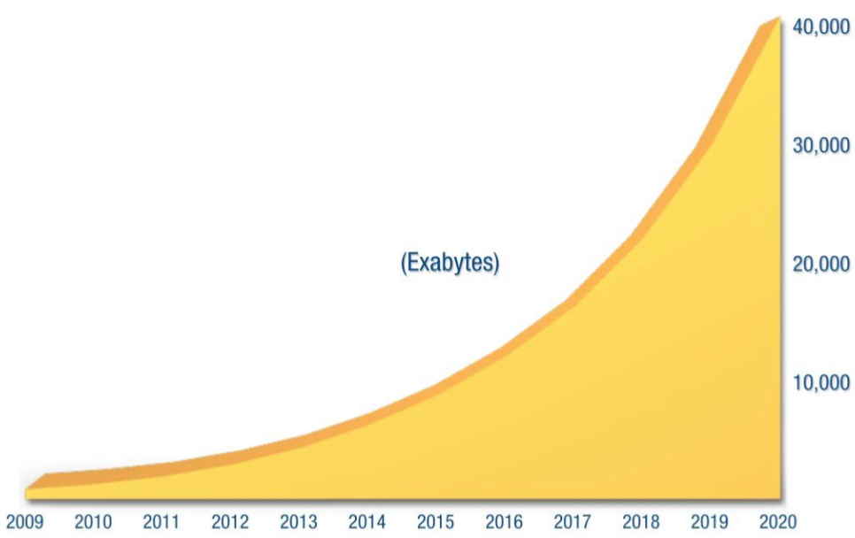 تزايد حجم البيانات